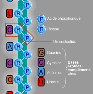 Auteur : Guillaume Bokiau sous licence GFDL Guillaume Bokiau